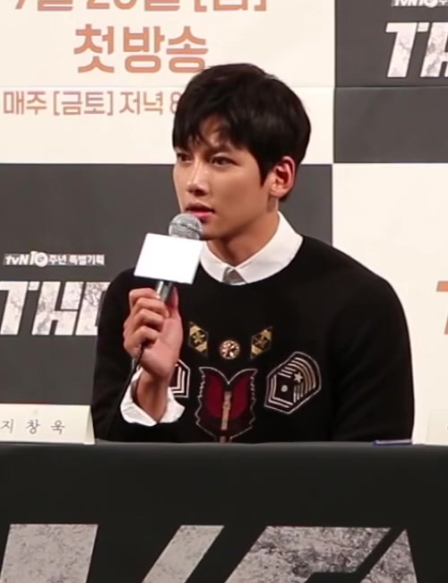 (TV10) 지창욱의 마지막 드리마 더케이투 제작발표회 현장